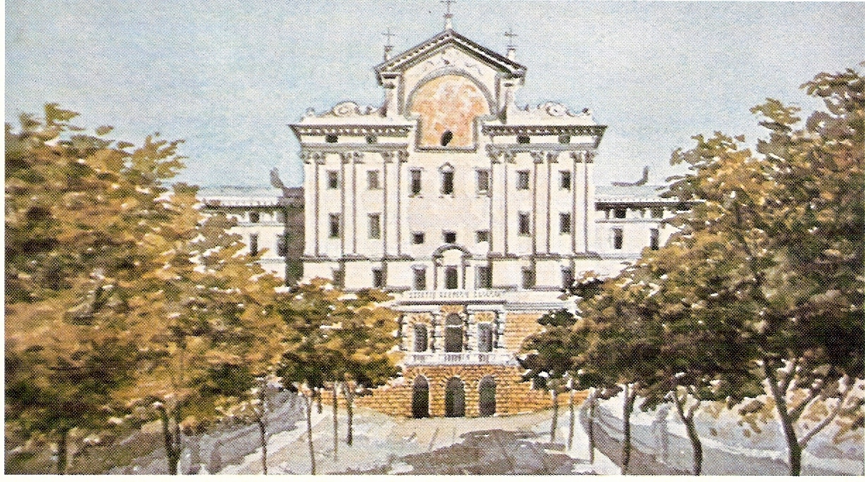 Acquerello del pittore Luigi Garibbo raffigurante l'Albergo dei Poveri di Genova